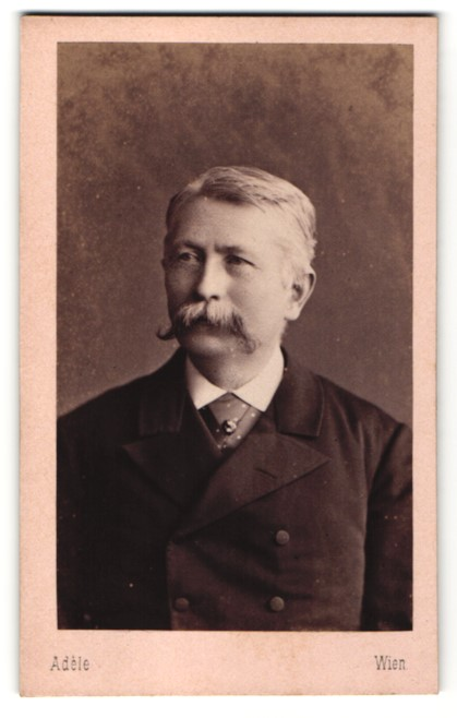 Portrait Karl Krticzka Ritter von Jaden, 1824-1885, Polizeipräsident von Wien